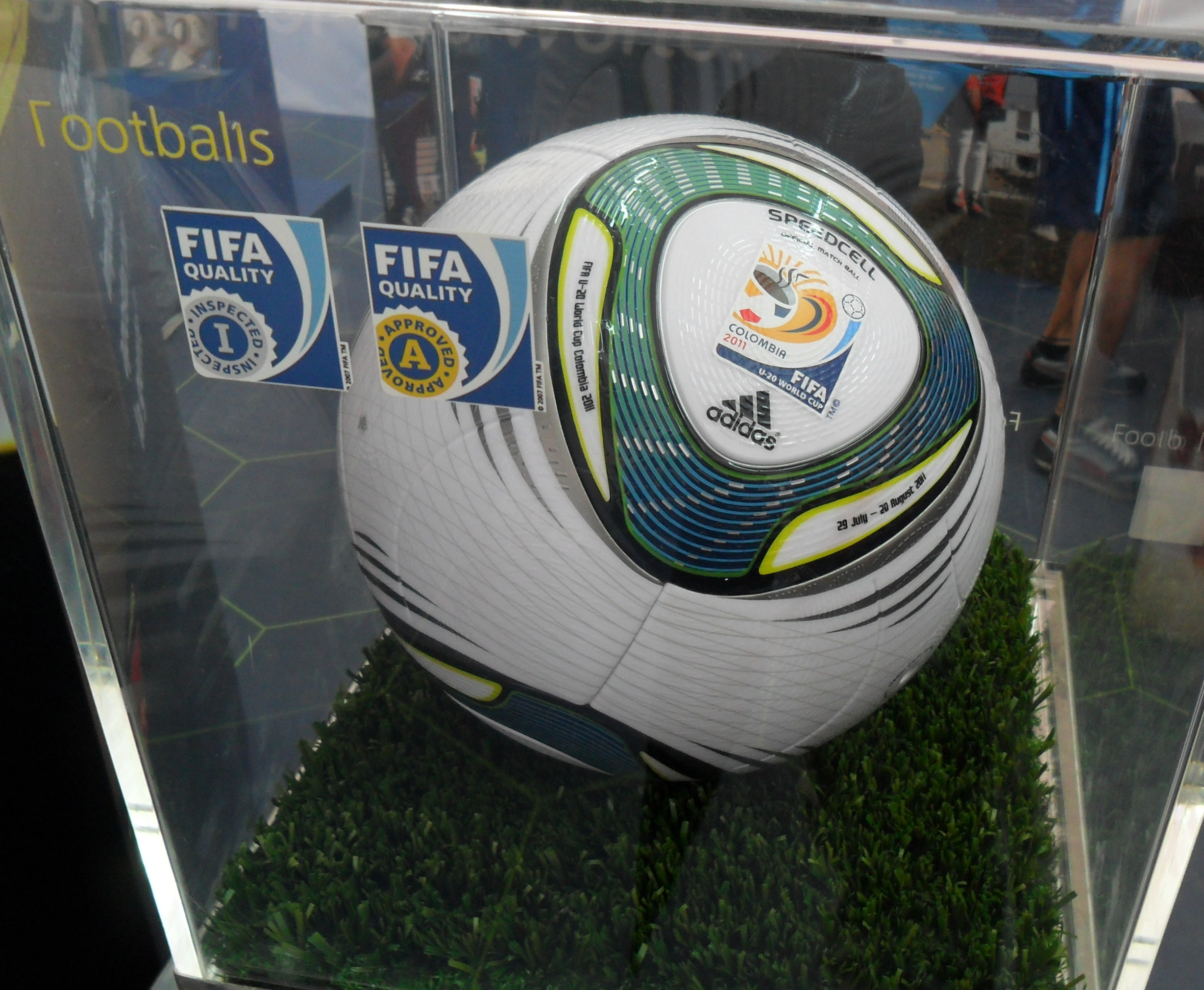 Balón Adidas Speedcell para la Copa Mundial Sub-20 de la FIFA Colombia 2011